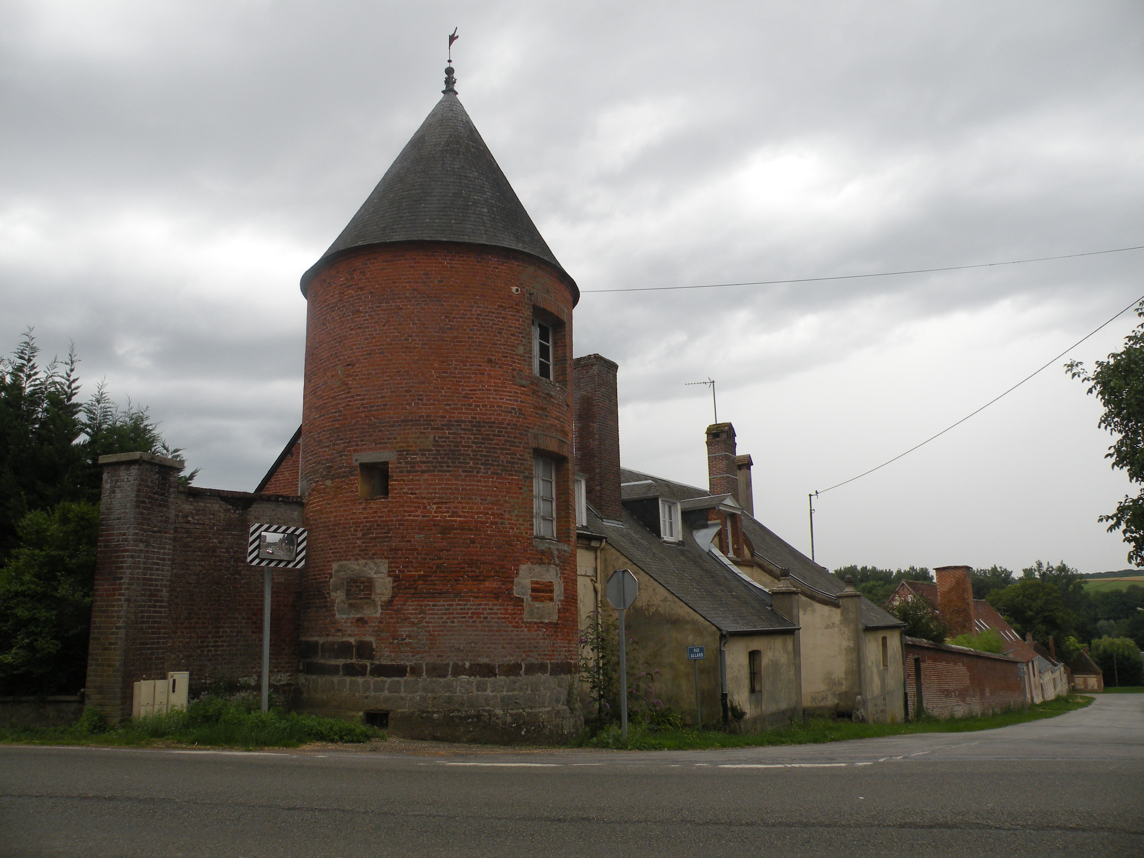 Crillon (Oise)